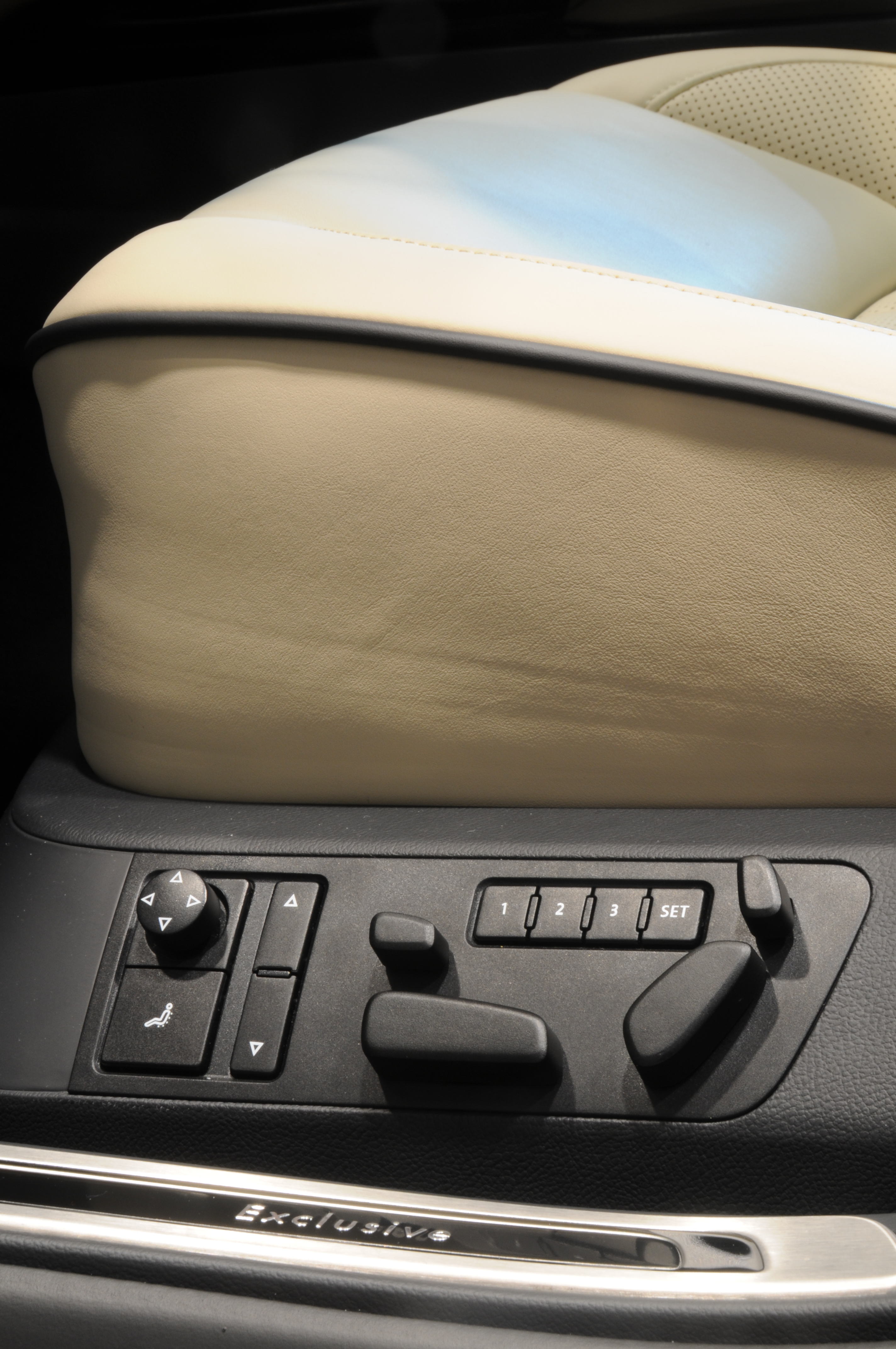 Detail Volkswagen Pheaton